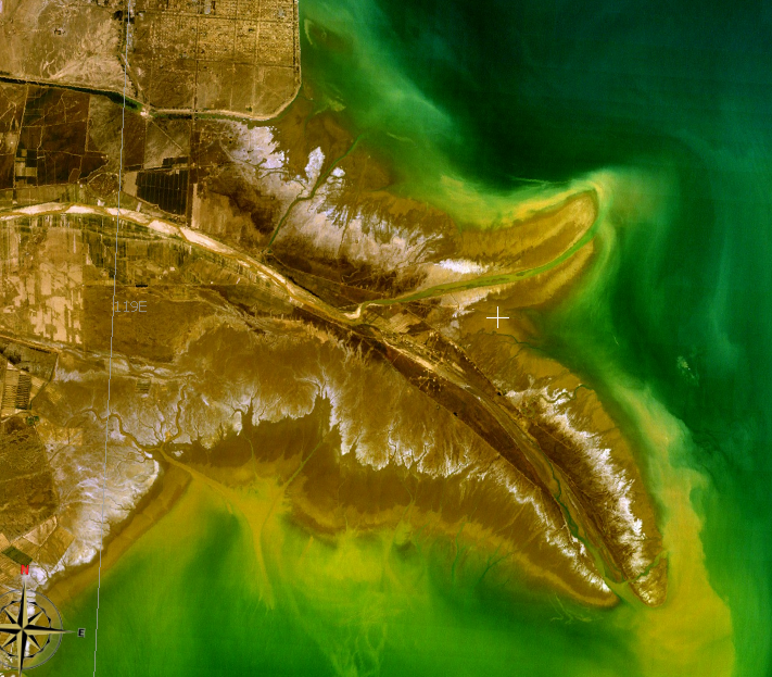 中文（中国大陆）: 黃河河口